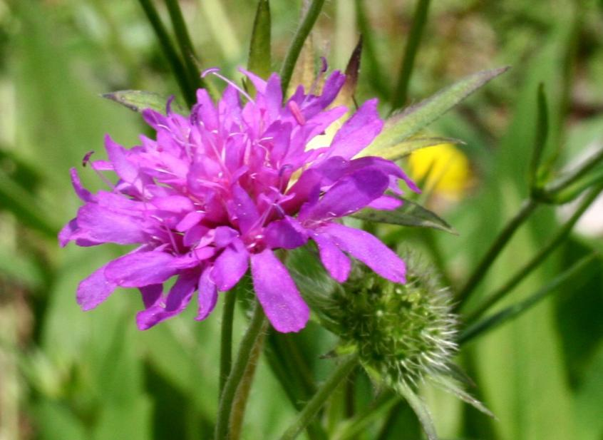 Knautia ressmannii